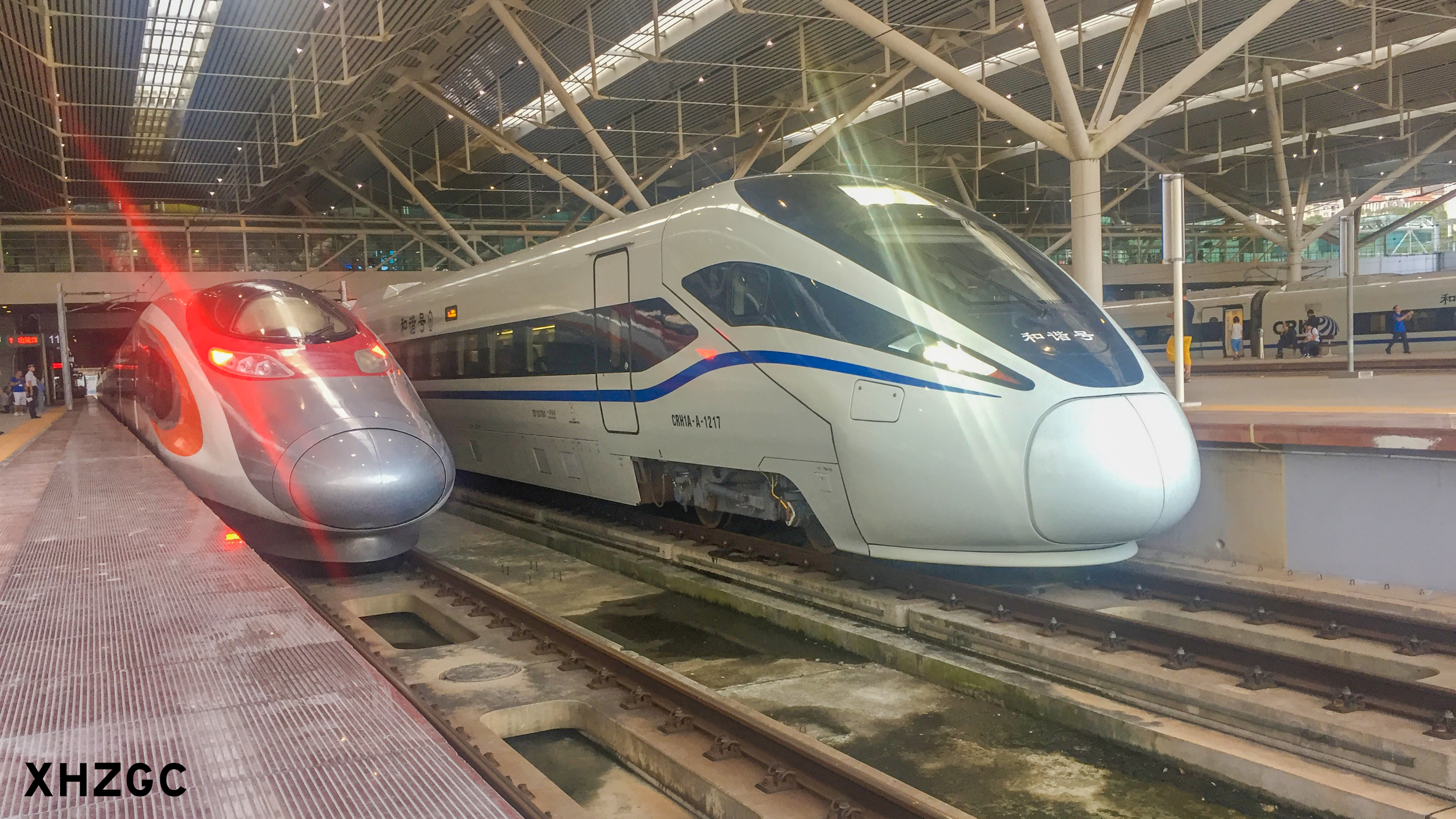 中文（中国大陆）: 0923的G5736到达深圳北后立折 右边是G6382首班跨线车去往潮汕